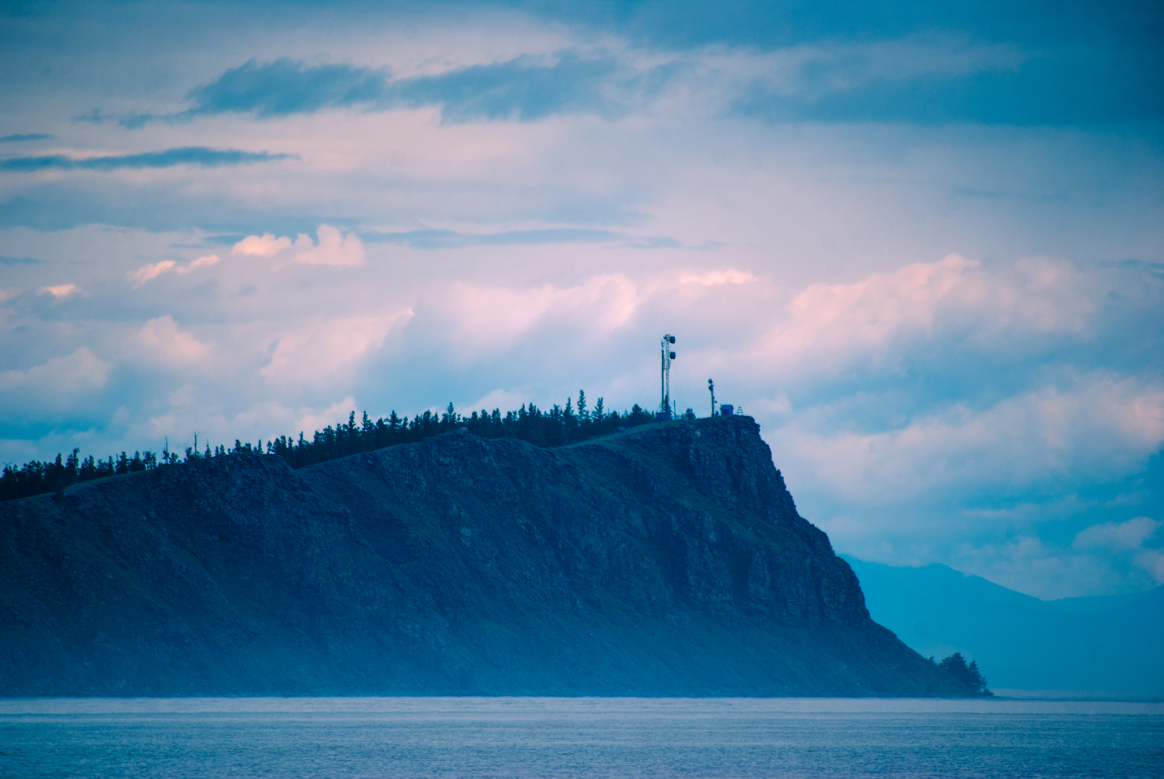 Мыс Лударь: район, Бурятия This image is related to the protected area of Russia number 0310209